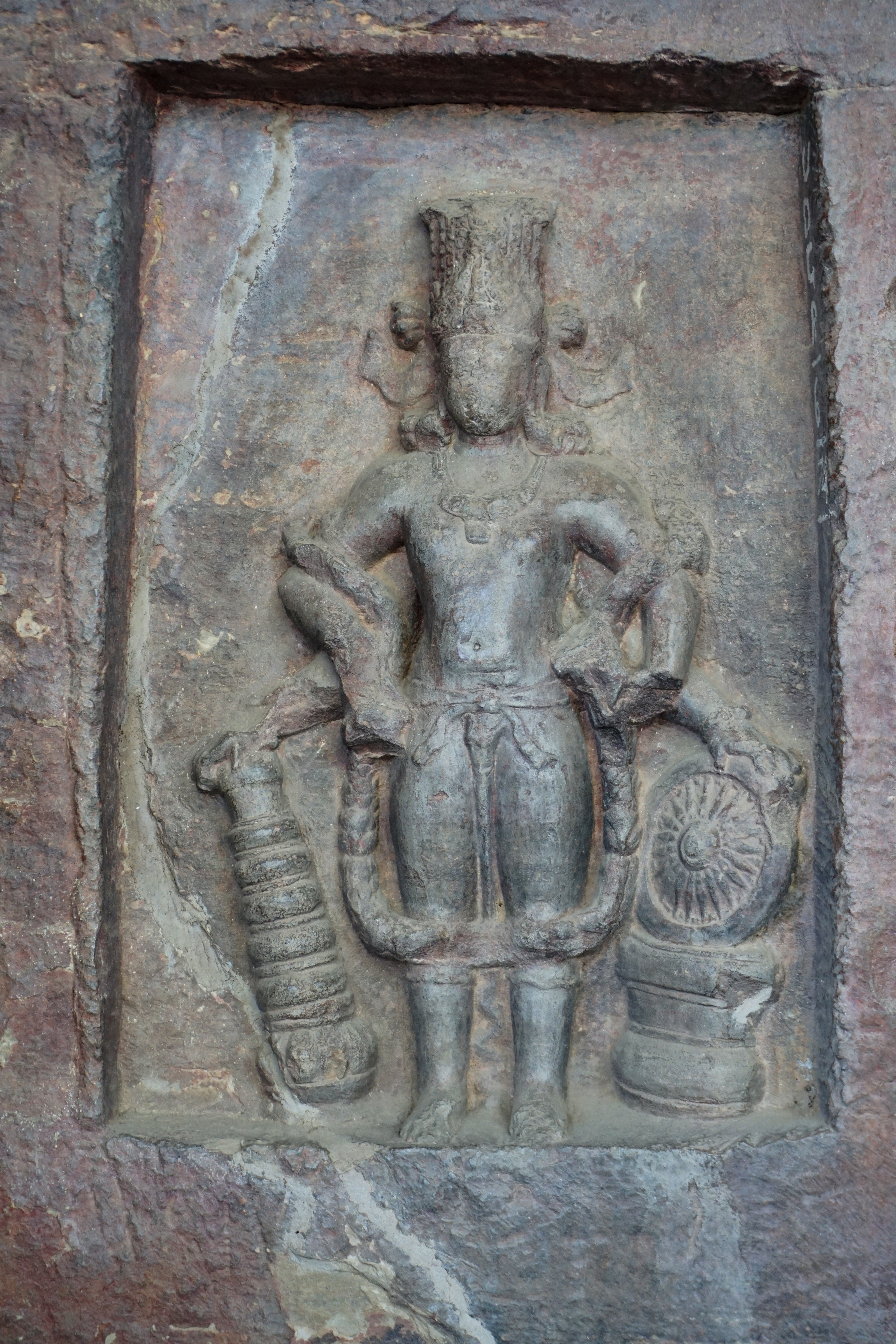 Udayagiri Caves, Vidisha, India